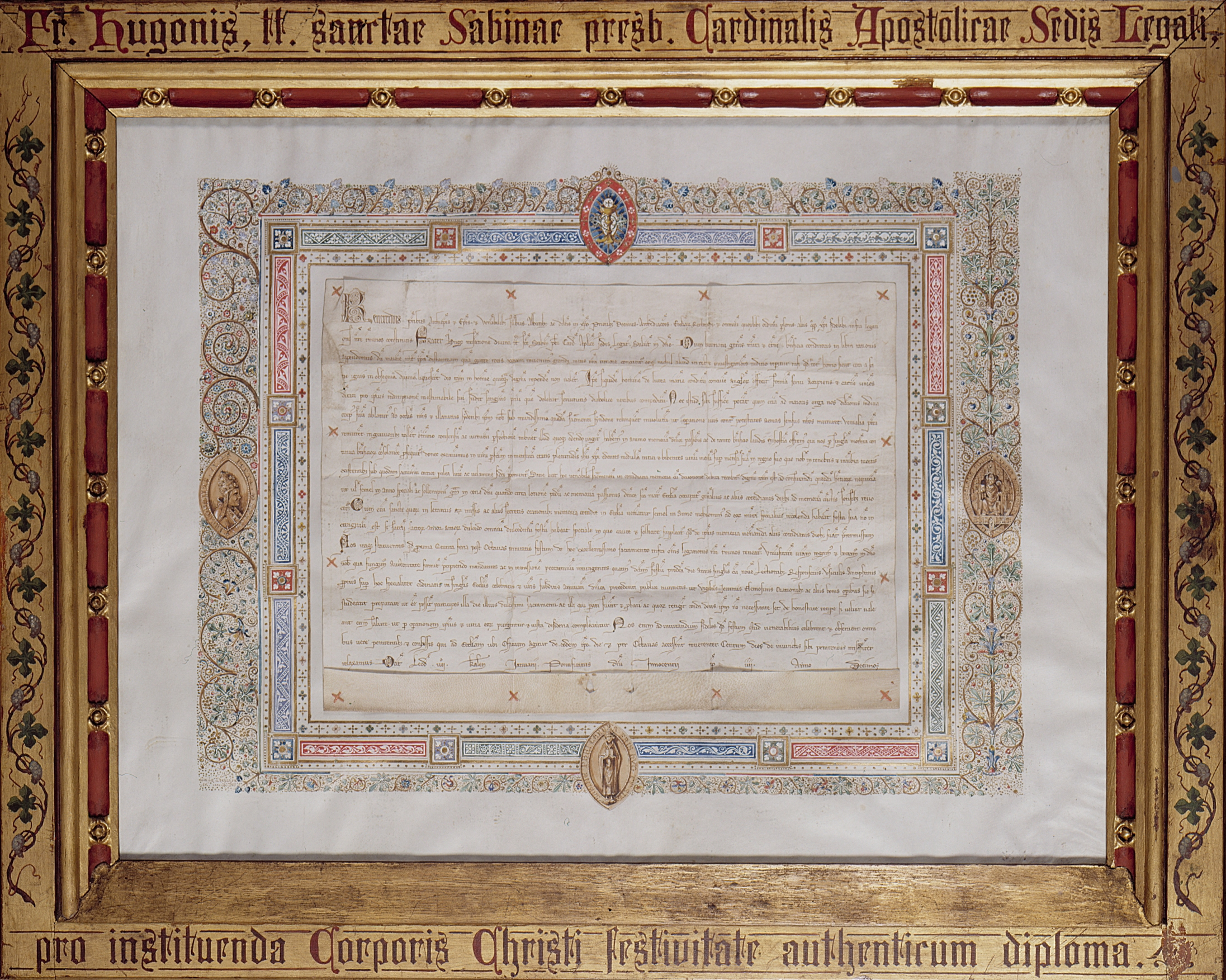 Diplôme d'institution de la Fête-Dieu Document sur parchemin daté du 29 décembre 1252 Enluminure signée et datée en b. à g., Émile Deshayes, MCMVII (Musée du Grand Curtius, Liège)